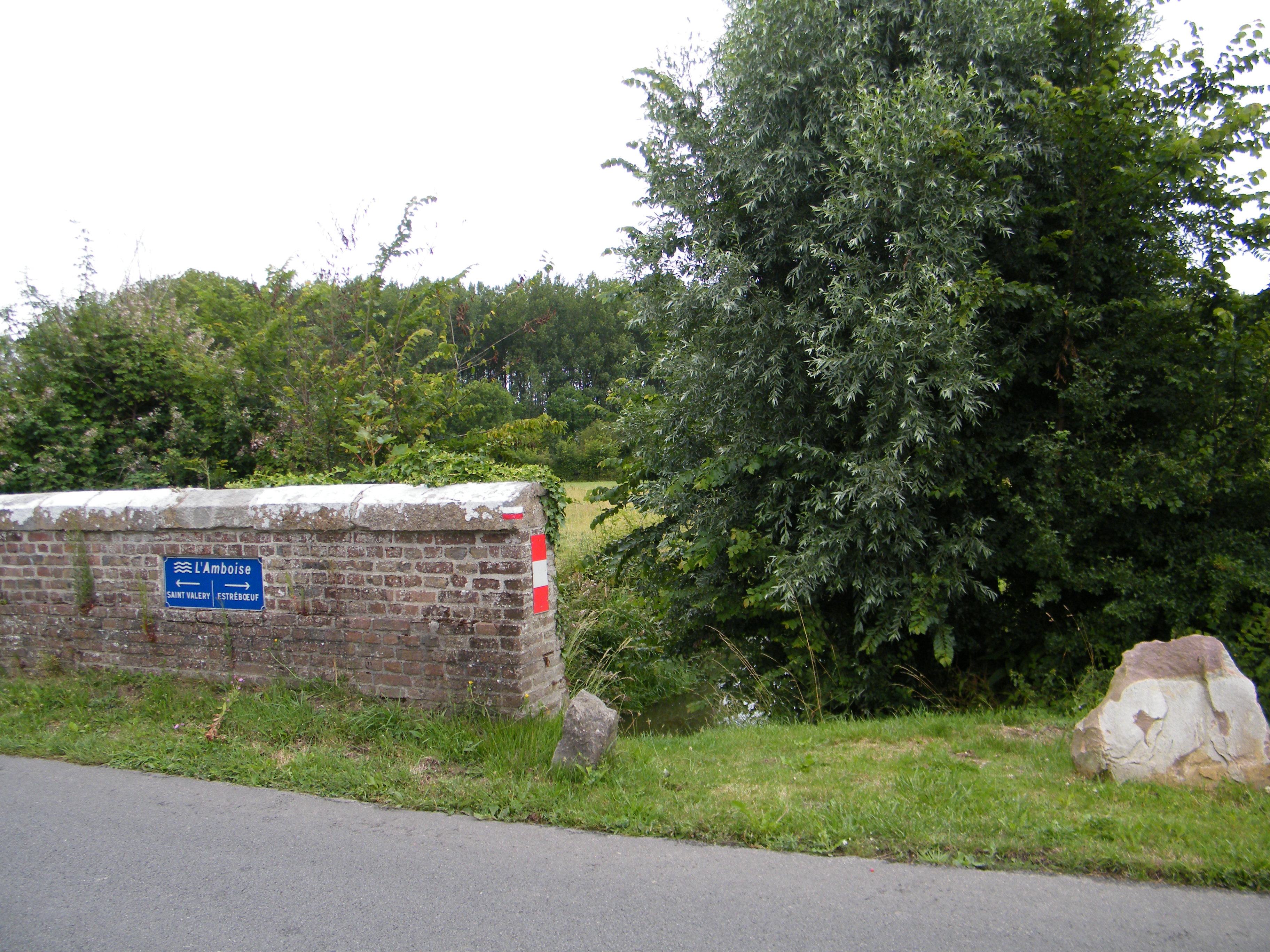 L'Amboise, limite entre Ribeauville (Hameau de Saint-Valery) et Estréboeuf, Somme, France